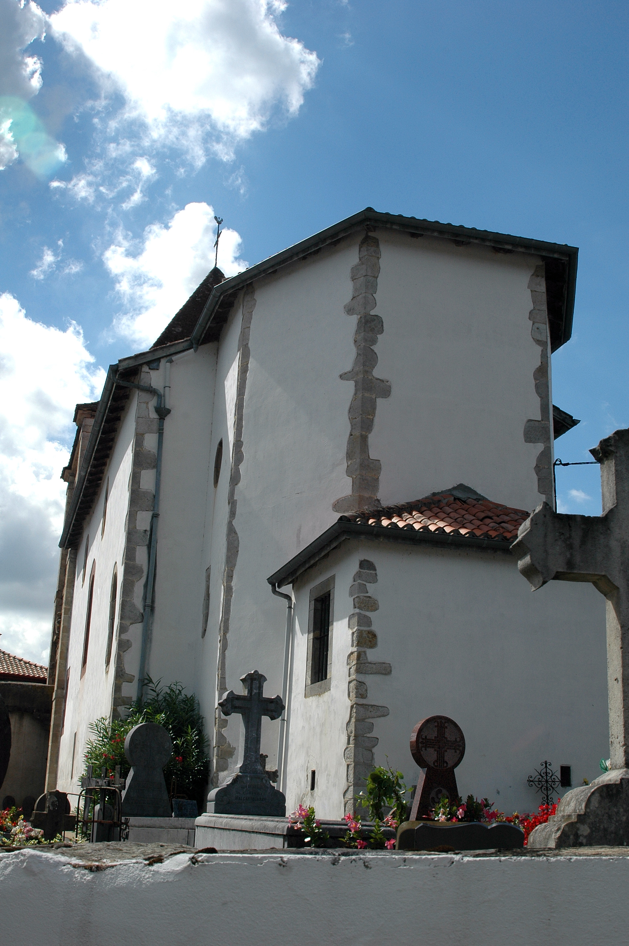 Louhossoa, l'église Notre-Dame-de-l'Assomption et les stèles. Photo prise le 03/08/06 par Harrieta171